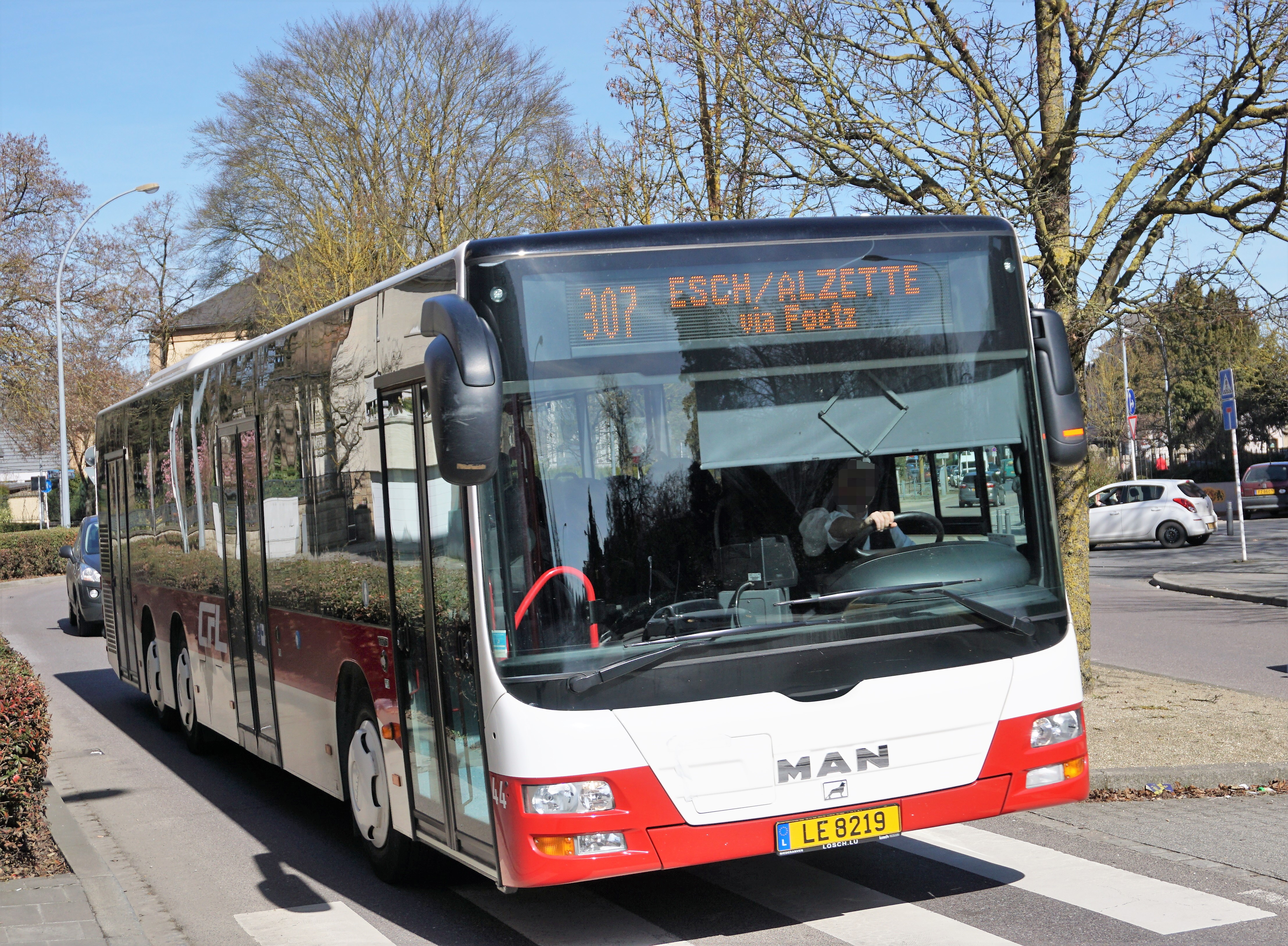 Esch-sur-Alzette, autobus MAN Lion's City C LE8219, société CFL, ligne 307